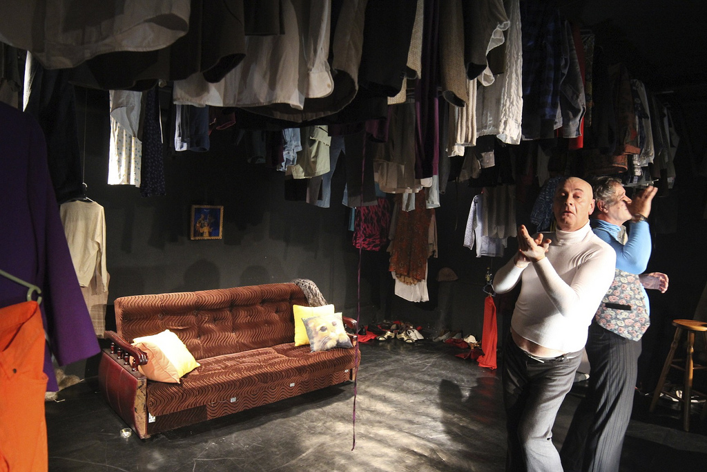 Paweł Sanakiewicz w roli Lukrecji i Edward Kalisz w roli Patrycji na scenie Teatru Nowego w Krakowie.